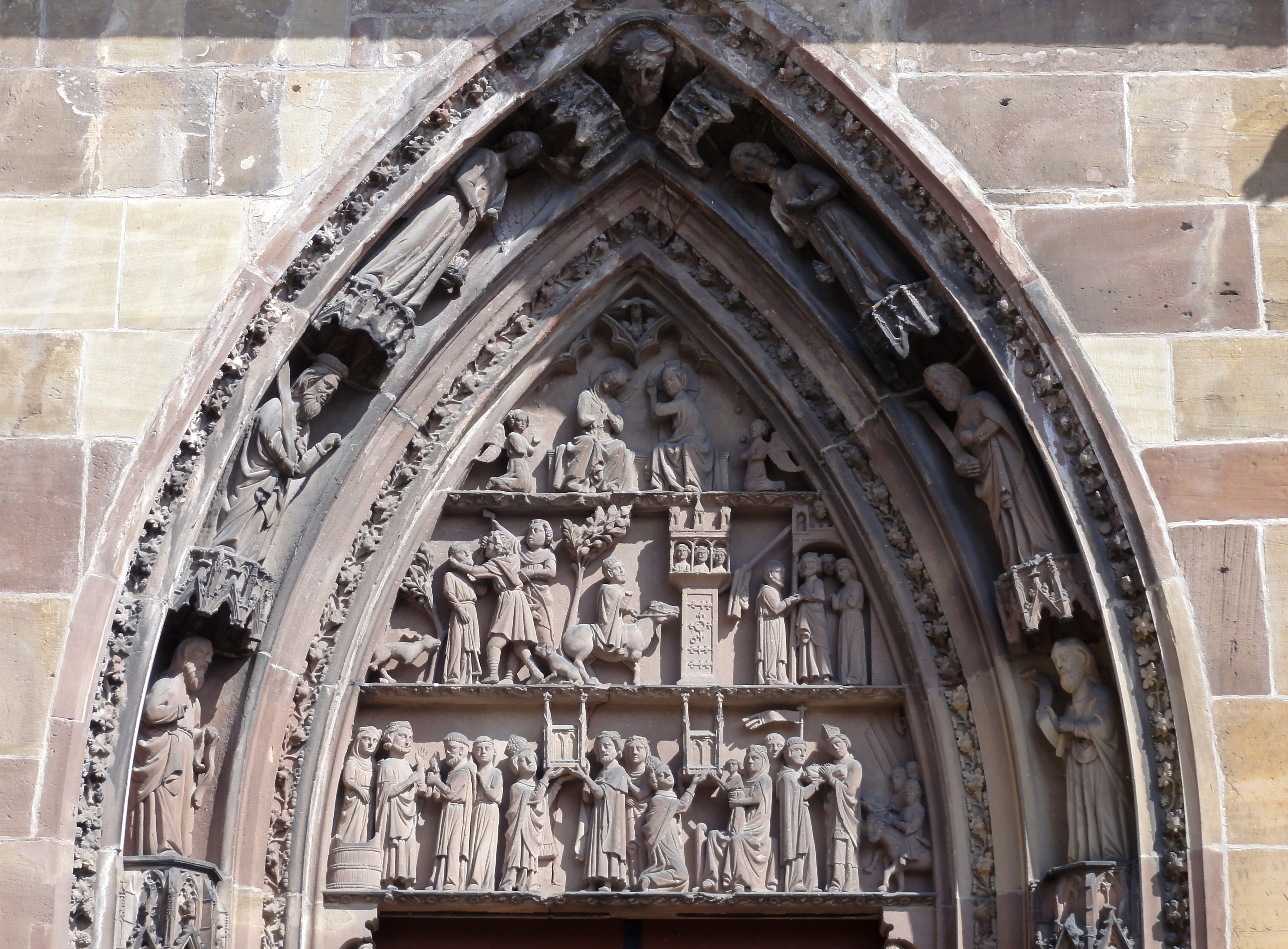 Alsace, Bas-Rhin, Niederhaslach, Collégiale Saint-Florent: (PA00084831, IA67011296, IA67011295). Tympan du portail principal (XIVe): Couronnement de la Vierge; Vie de St-Florent (1. les chasseurs du roi Dagobert agressent l'ermite St-Florent, St-Florent arrive sur son âne au château du roi Dagobert à Kirchheim (le roi, son épouse et leur fille Rathilde sont représentés chacun à une fenêtre, au sommet d'une tour), la famille royale accueille St-Florent qui accroche son manteau à un rayon de soleil; 2. le roi Dagobert vient de sortir de son bain et de se rhabiller (St-Florent, en tenue de moine, lui donne le gant), le roi et son épouse donnent à St-Florent un modèle d'église, St-Florent place l'église sous la protection de la Vierge à l'Enfant (de la même manière que St-Florent, ce dernier, debout sur les genoux de la Vierge assise soutient le modèle d'église), l'évêque Rachio, suivi de soldats à cheval, donne les reliques de St-Florent, enveloppées dans un sac, à un moine de Haslach.